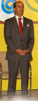 José Roberto Marinho na solenidade de lançamento do projeto "A Cor da Cultura, no Palácio do Planalto. Foto: Wilson Dias/ABr